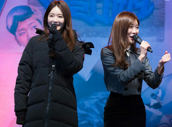 170114 비발디파크 라이딩 콘서트 - 다비치 직찍